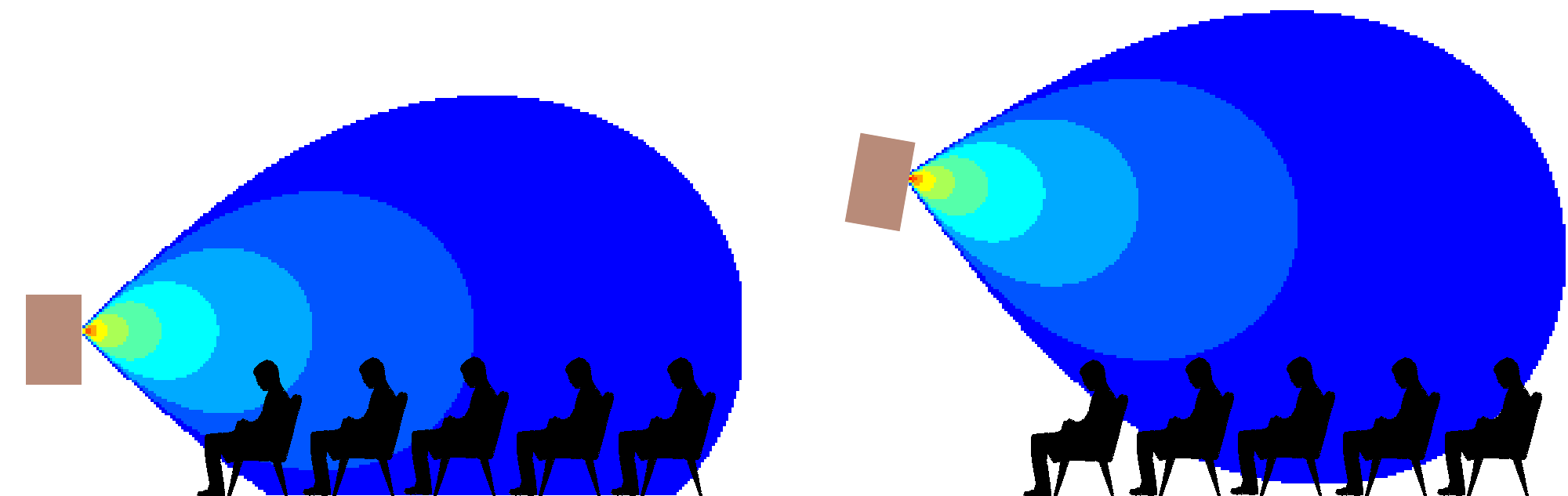 Comparaison de deux placements d'une enceinte ayant une directivité verticale de 60°. A gauche: à 1m20 au niveau des oreilles des auditeurs. A droite: à 2m50 avec une inclinaison de 10° vers le bas.